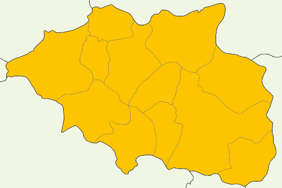 Çankırı'da 2014 Türkiye cumhurbaşkanlığı seçimi sonuçları